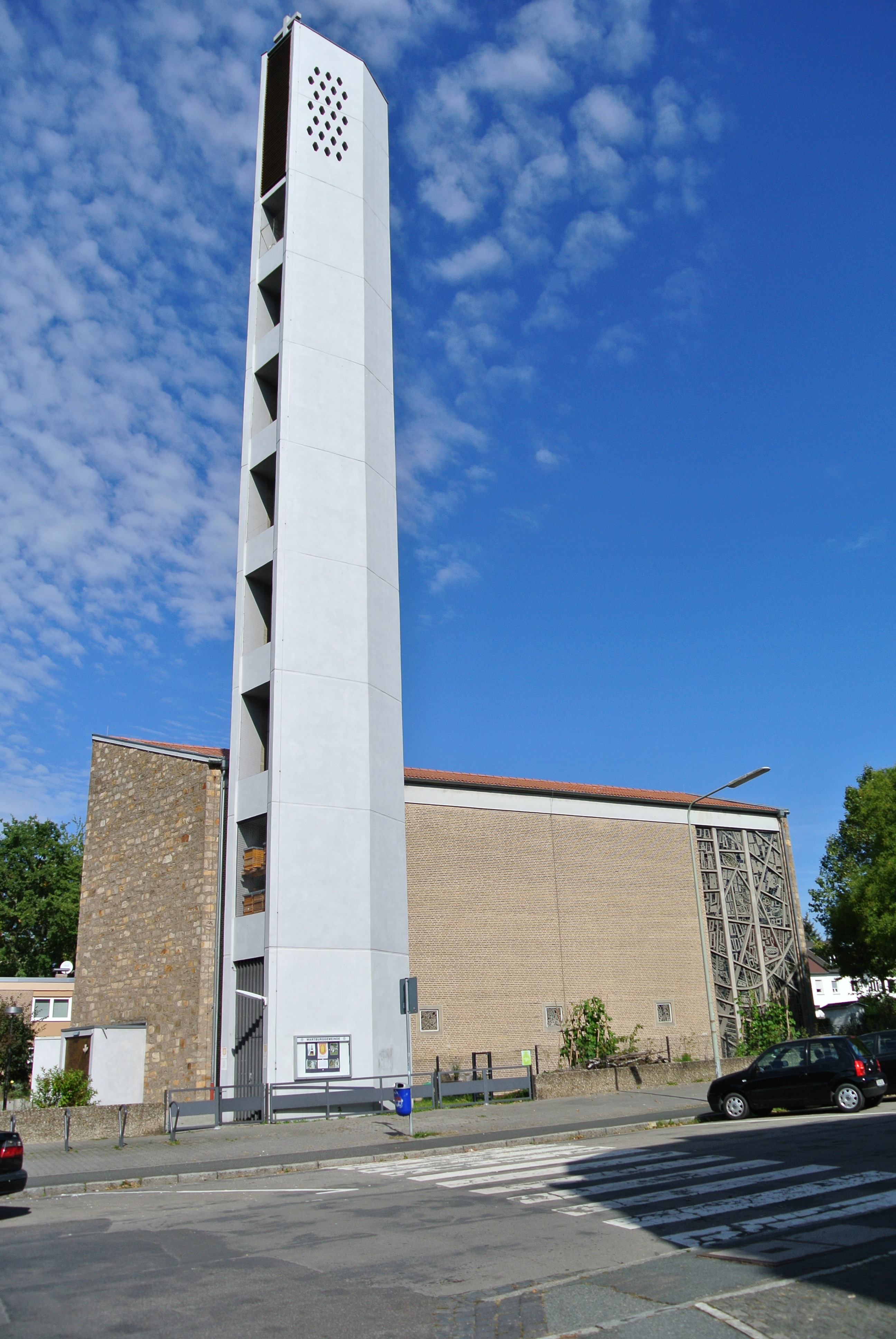 Wartburgkirche in Frankfurt-Nordend, Architekt: Walter W. Neumann, Baujahr 1962, von Südwesten